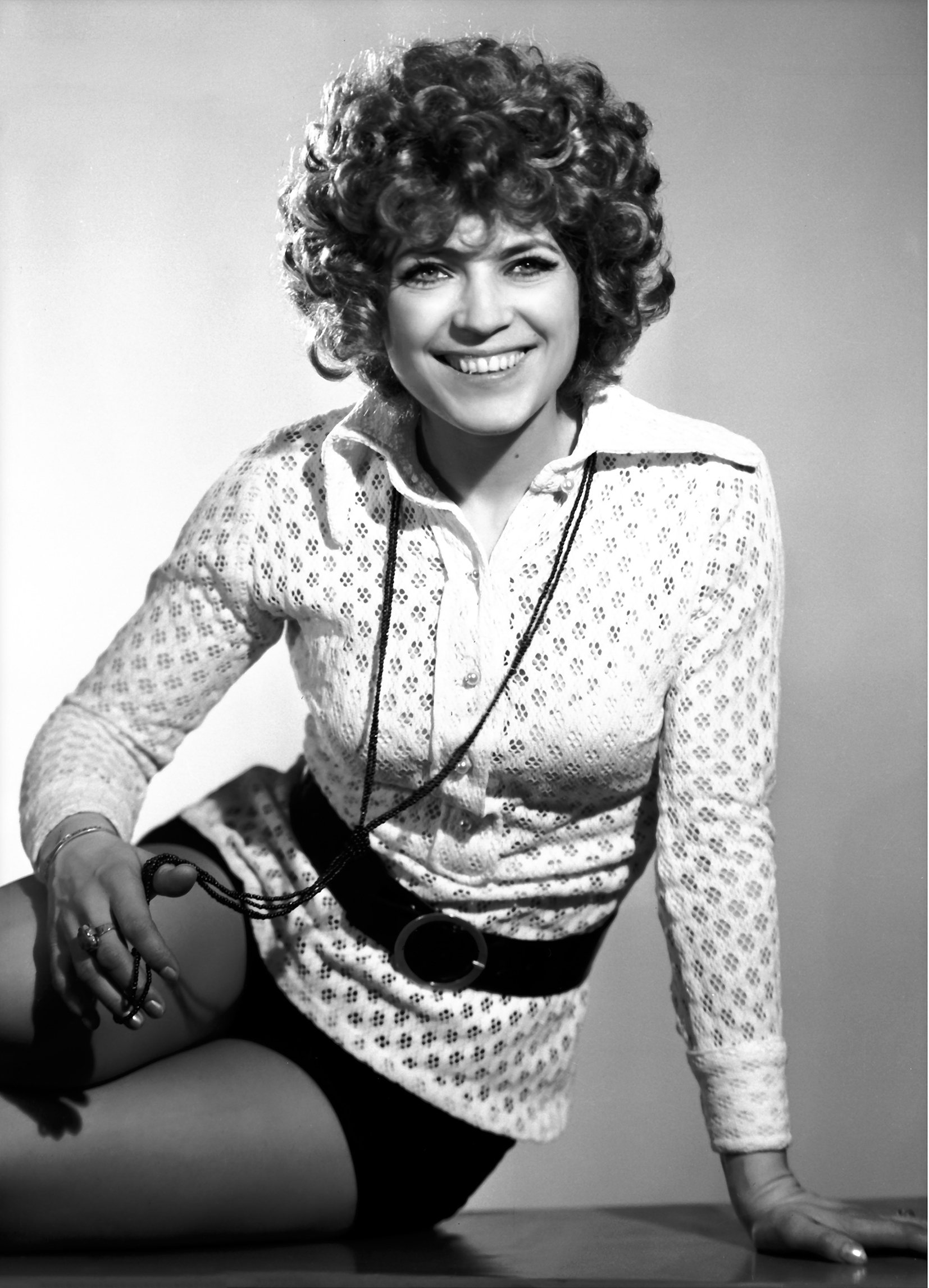 Kovács Kati magyar előadóművész, énekesnő